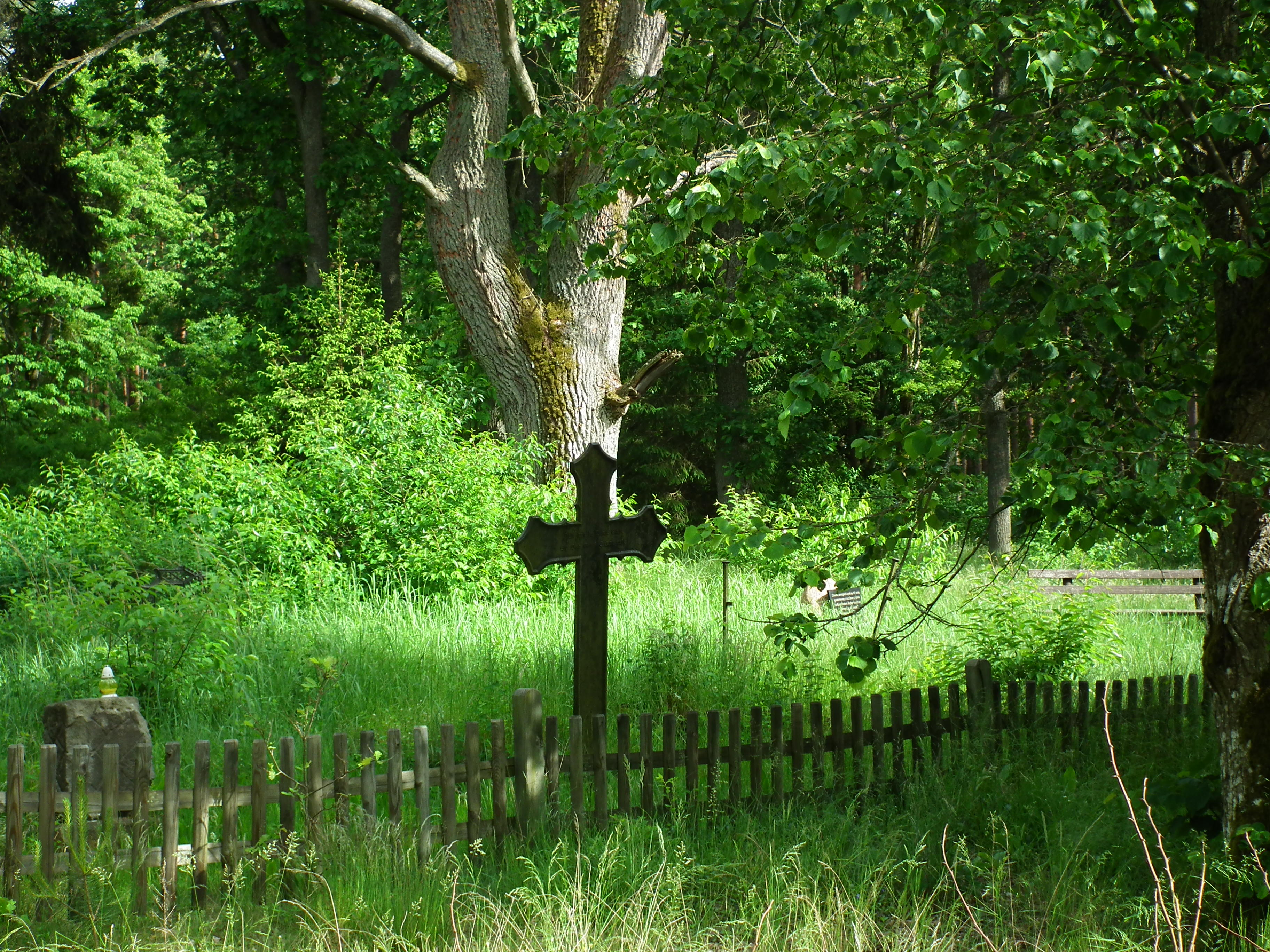 Stary cm. ewangelicki w Lubiewicach, gm. Cekcyn.